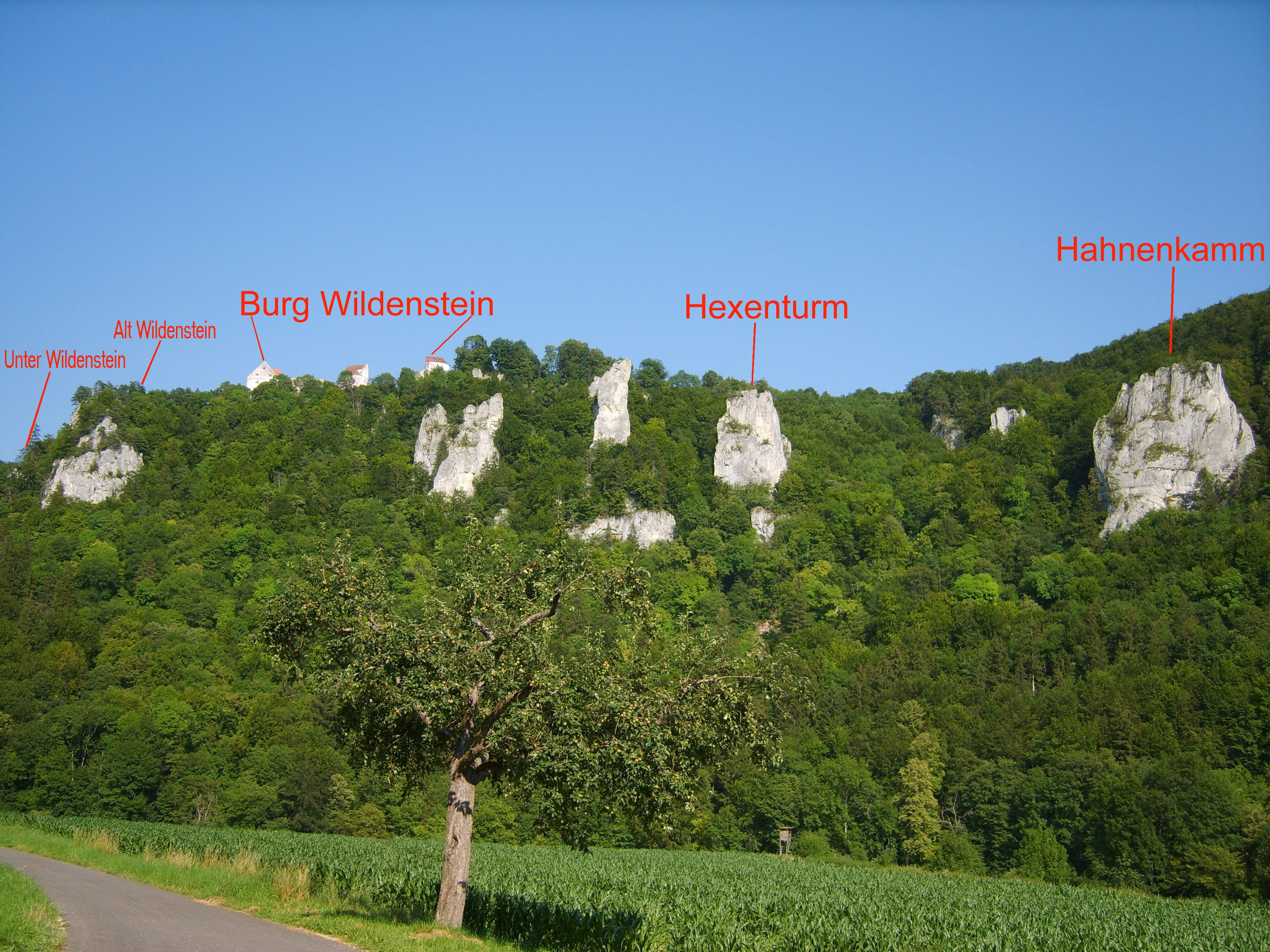 Burg Wildenstein Burg Wildenstein vom Donautal bei der St. Maurus Kapelle, Oberhausen aus gesehen. Mit Lagehinweis auf die Vorgängerburgen